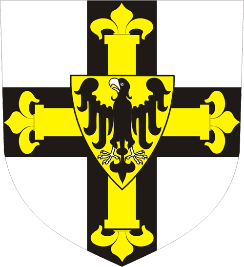 Teutonic Order - Coat of Arms of the Grandmaster Wappen der Hochmeister des Deutschen Ordens